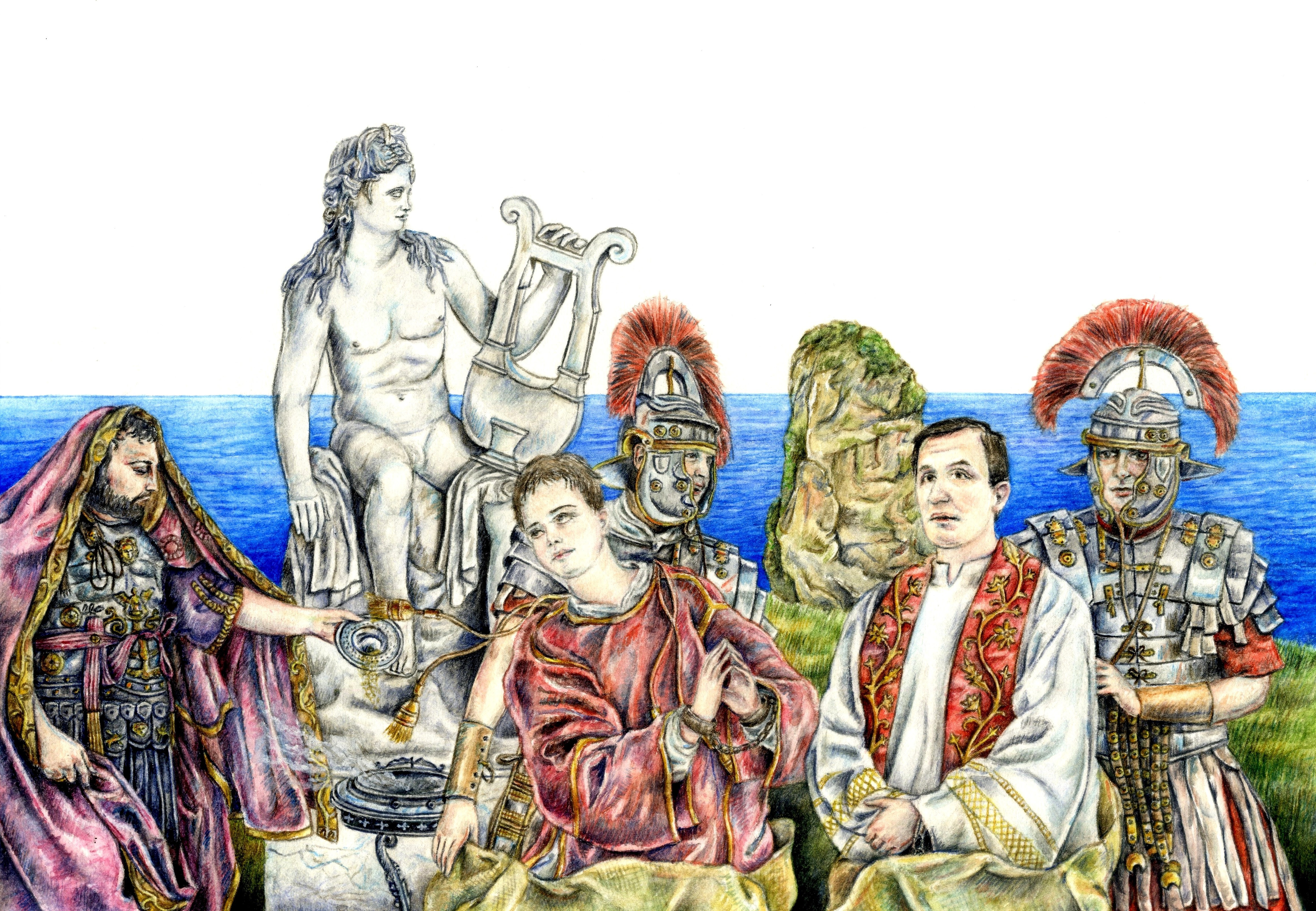 Dopo la morte di Leonzio, Lussurio - il primo cittadino di Terracina - fa arrestare il presbitero Giuliano e pronuncia la sentenza di morte: ordina di chiudere il diacono Cesario ed il suo maestro Giuliano in un sacco e gettarli nel mare. Cesario, poco prima di essere condannato, dice a Lussurio: “L’acqua, nella quale sono stato rigenerato, mi riceverà come suo figlio che ha trovato in essa una seconda nascita: oggi mi renderà martire con Giuliano, mio Padre, che una volta mi fece cristiano. Quanto a te, Lussurio, oggi stesso morirai con un morso di un serpente, affinché tutti i paesi sappiano che Dio vendicherà il sangue dei suoi servi, e delle vergini che facesti perire tra le fiamme”. Il 1° novembre dell’anno 107 d.C. i condannati sono chiusi in un sacco e precipitati, secondo la tradizione, dall’alto della guglia del “Pisco Montano” nel mare, dove muoiono per soffocamento.